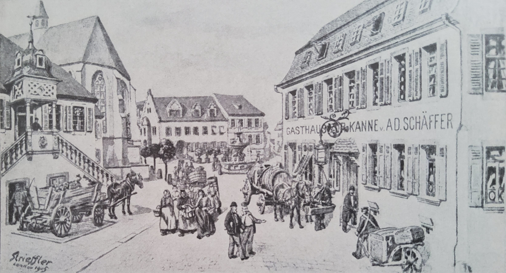 Der Markplatz Deidesheims 1905, gezeichnet von Heinrich Strieffler. Ansicht von Süden, von der Hauptstraße her (heute die Deutsche Weinstraße). Linker Hand ist das historische Rathaus, dahinter die Ulrichskirche. Rechts daneben das Haus der Brüder Eckel (heute Deidesheimer Hof), daneben der Dienheimer Hof. Davor der Andreasbrunnen. Rechts ist das ehemalige Gasthaus "Zur Kanne". Dessen Gastwirt Adolf Schäffer vertrieb dieses Bild als Postkarte.